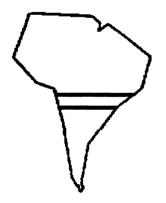 Símbolo de la candidatura independiente de Jorge Soria en las elecciones parlamentarias de Chile de 1989.